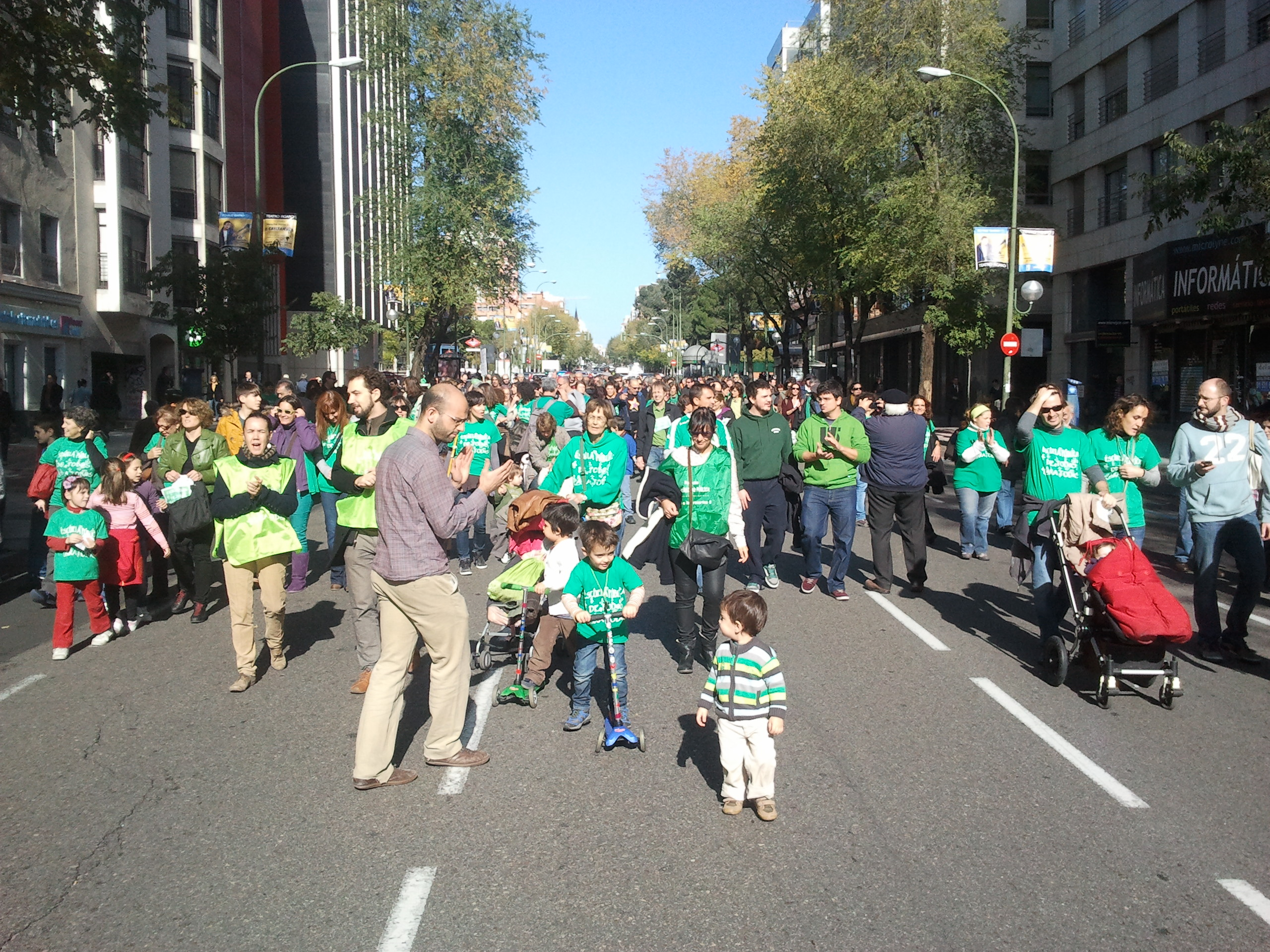 Piquete Plataforma por la Escuela Pública Chamberi, Madrid.